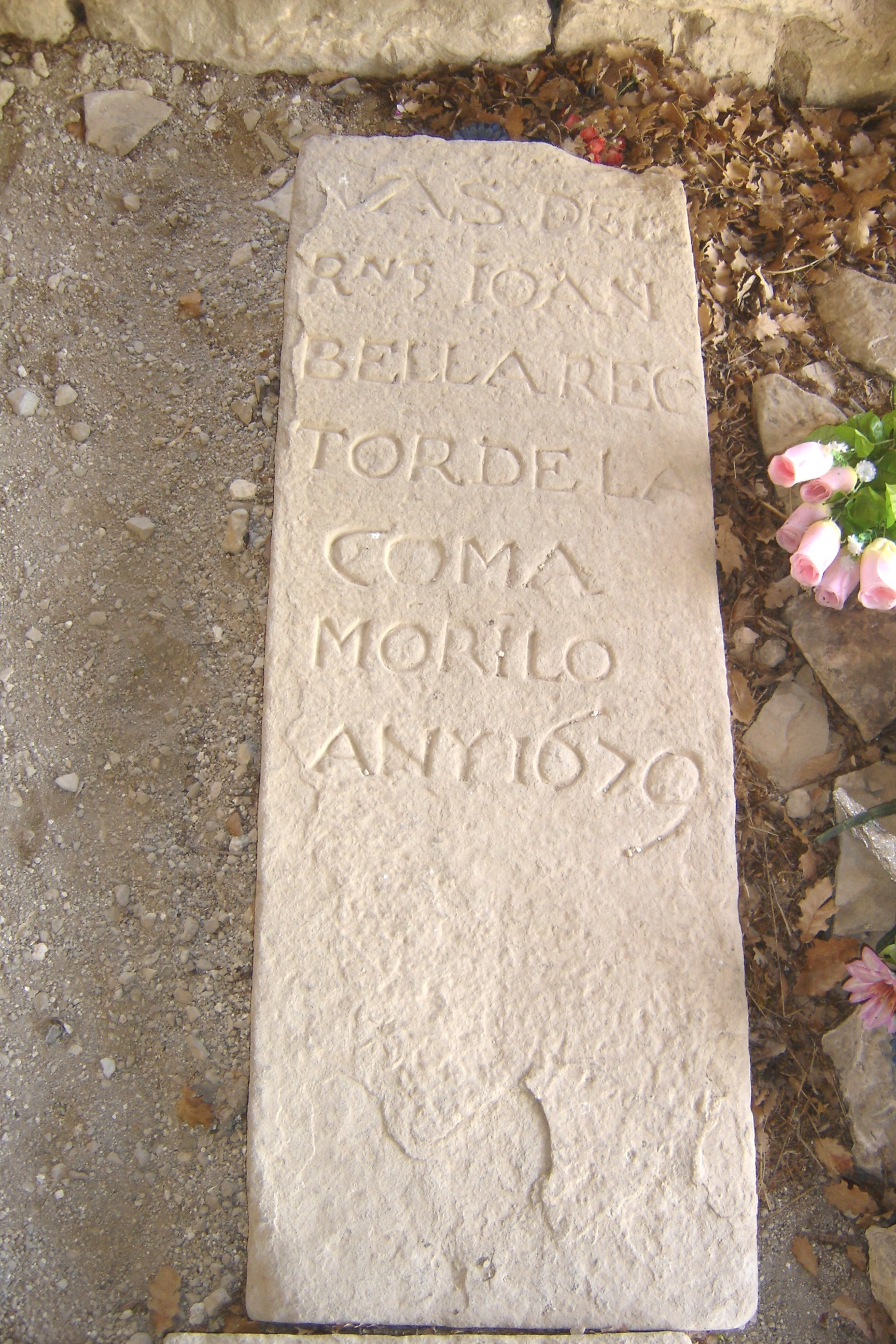 L'ermita de Sant Lleïr de Casabella, al municipi de La Coma i la Pedra, a la Vall de Lord (Solsonès). La làpida del porxo